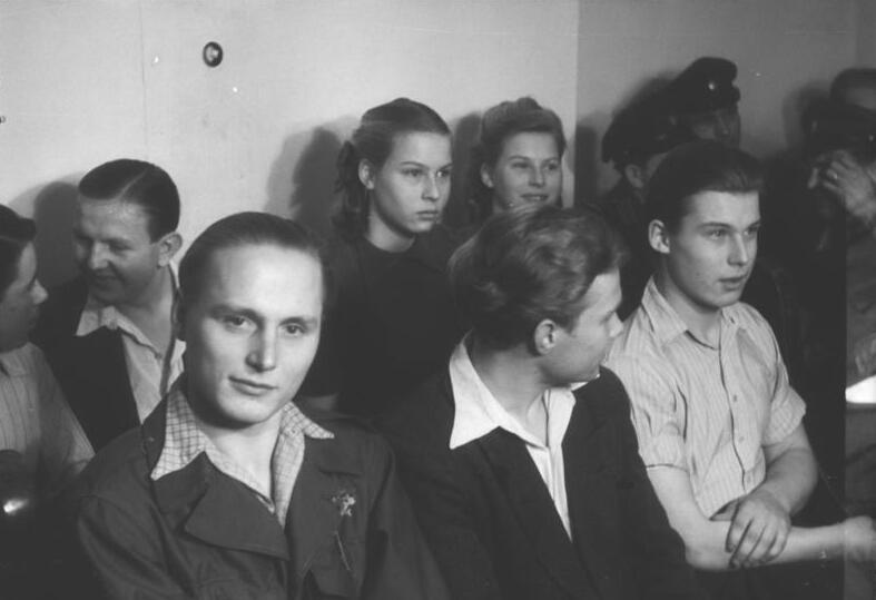 Zentralbild [Berlin] Öffentlicher Prozeß gegen jugendliche Wahlsaboteure. Am 15. Juni 1949, 9 Uhr, begann im Hause der Gasag, Neue Friedrichstr. 109-110, Saal 409, die öffentliche Verhandlung gegen neun Jugendliche, die in der Nacht zum 15. Mai in Bohnsdorf bei Grünau durch Verbreitung verleumderischer Propaganda die Wahlen zum III. Deutschen Volkskongreß zu stören versuchten. Den 19jährigen Student Jürgen Gerull ist als Urherber der Aktion angeklagt. UBz.: 1. Reihe v.l.n.r. Jürgen Gerull, Werner Wilke (Kunstschmiedelehrling, 18 Jahres), Jürgen Gribach (Brauerlehrling, 19 Jahre). 2.Reihe v.l.n.r.: Siegfried Ludtke (Schmied, 18 Jahre), Eva Gribach (Schwesternvorschülerin, 17 Jahre), Ruth Gribach (Schneiderlehrling , 17 Jahre). Aufn. Illus/Rudolph 3431-49 15.6.1949